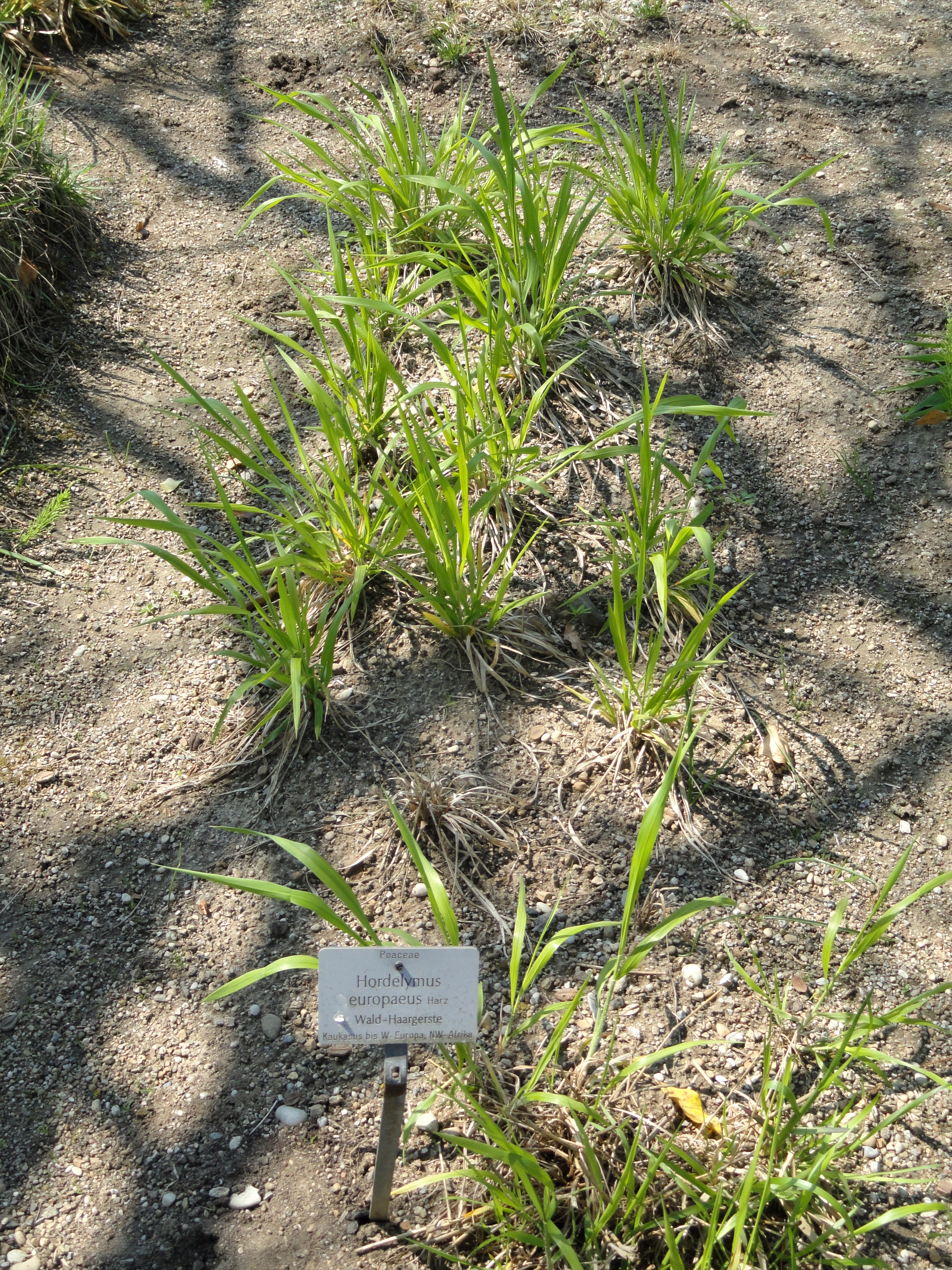 Hordelymus europaeus specimen in the Botanischer Garten München-Nymphenburg, Munich, Germany.